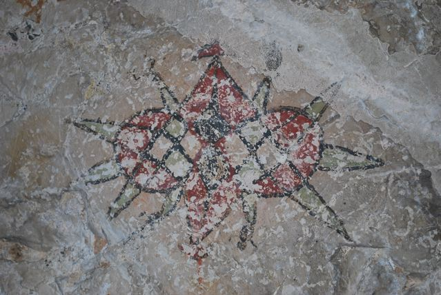 Höhlenmalerei in Lene Hara